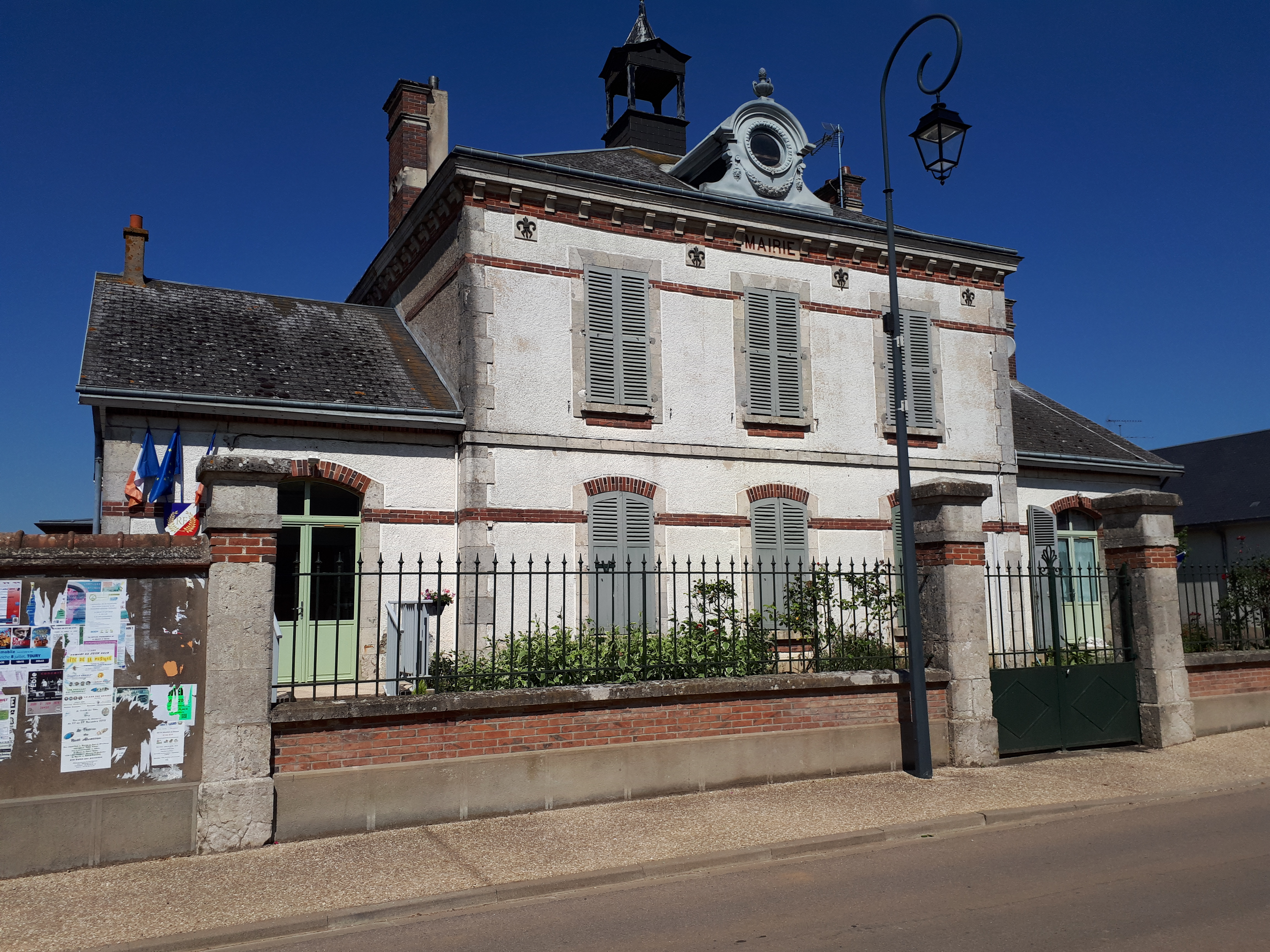 Mairie de Baudreville (Eure-et-Loir).